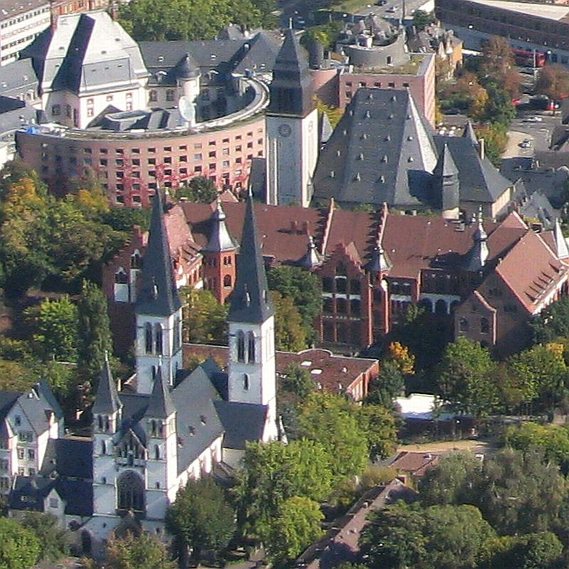 Luftbild Wiesbaden, Dreifaltigkeitskirche, Lutherkirche